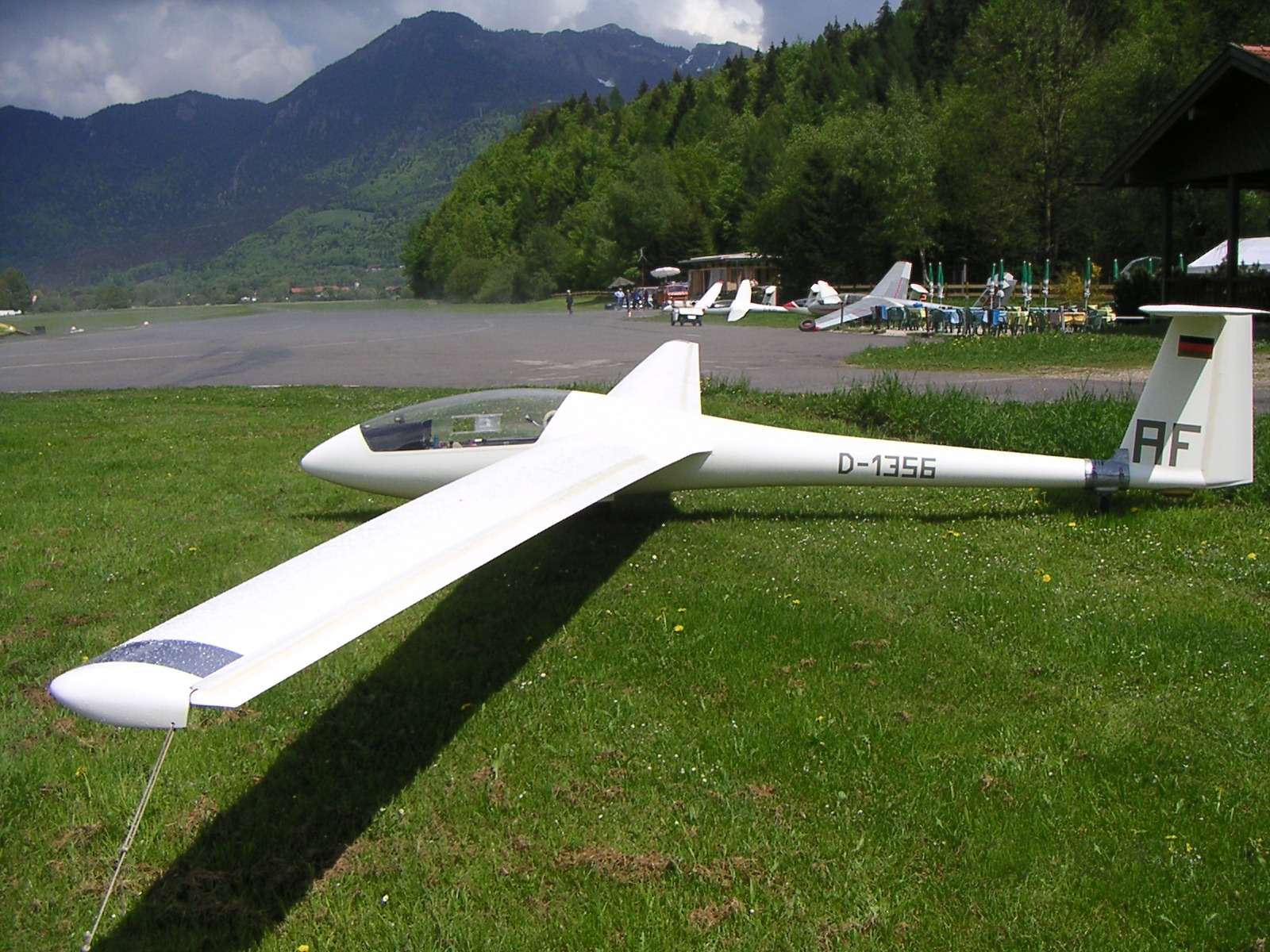 LS-3 (S/N 3001) in Unterwoessen (after a rain shower)